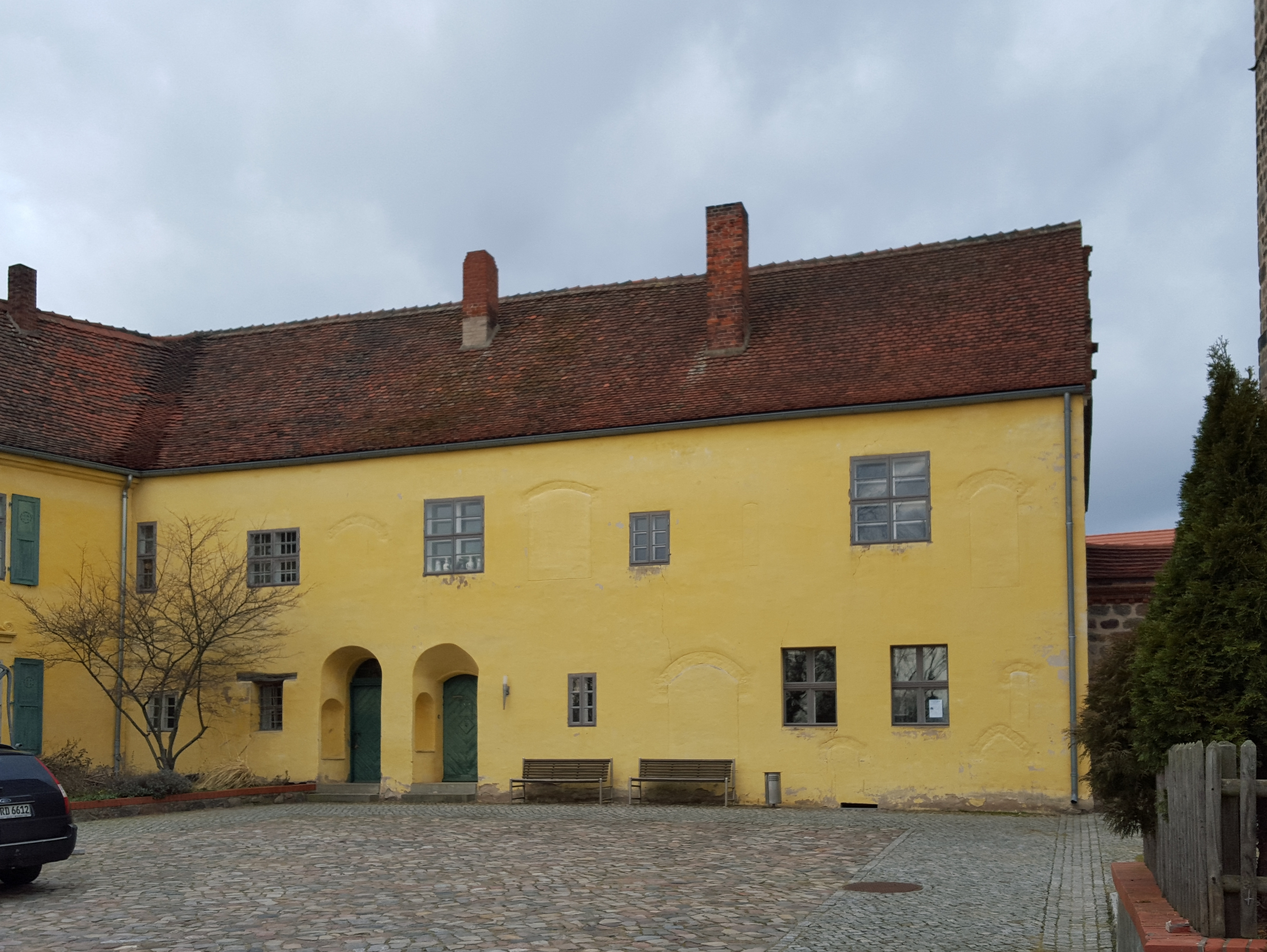 Klostergebäude in Ziesar